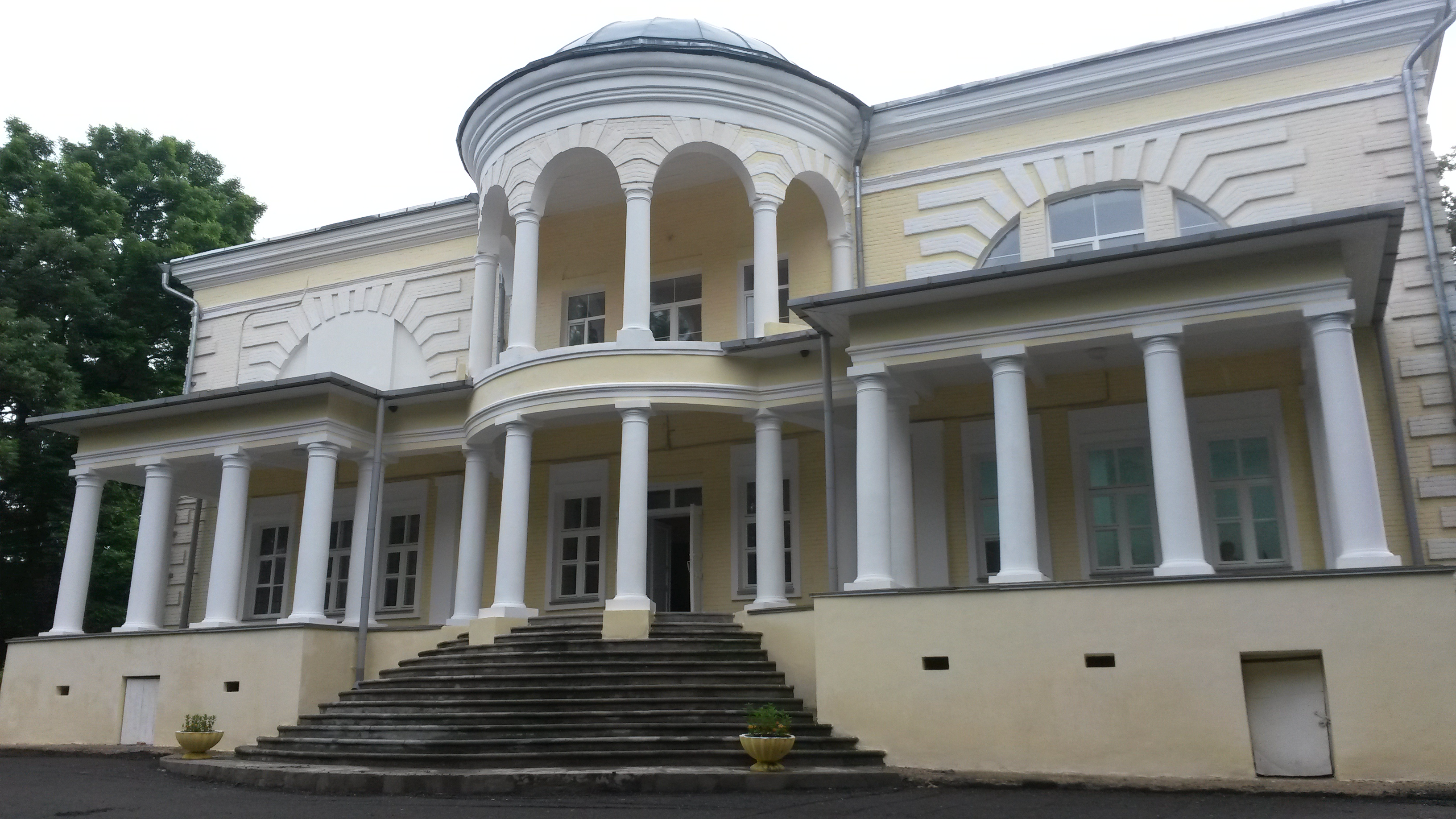 Главный дом (Липецкая область, Елец, село Пальна-Михайловка)